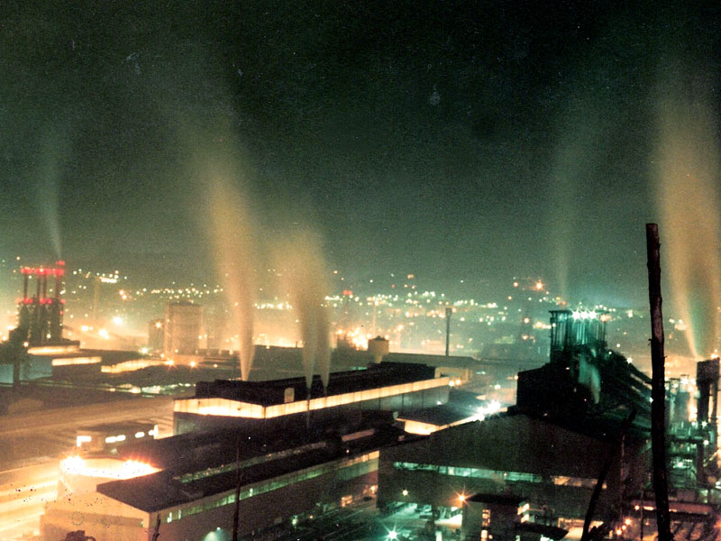 Gli stabilimenti, oggi dismessi, dell'Italsider di Bagnoli